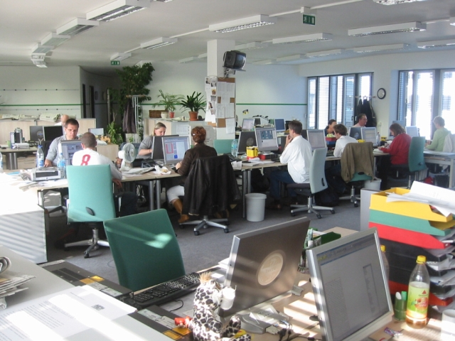 Der Newsdesk oder auch Macher-desk in der Redaktion der Frankfurter Rundschau im Colosseo